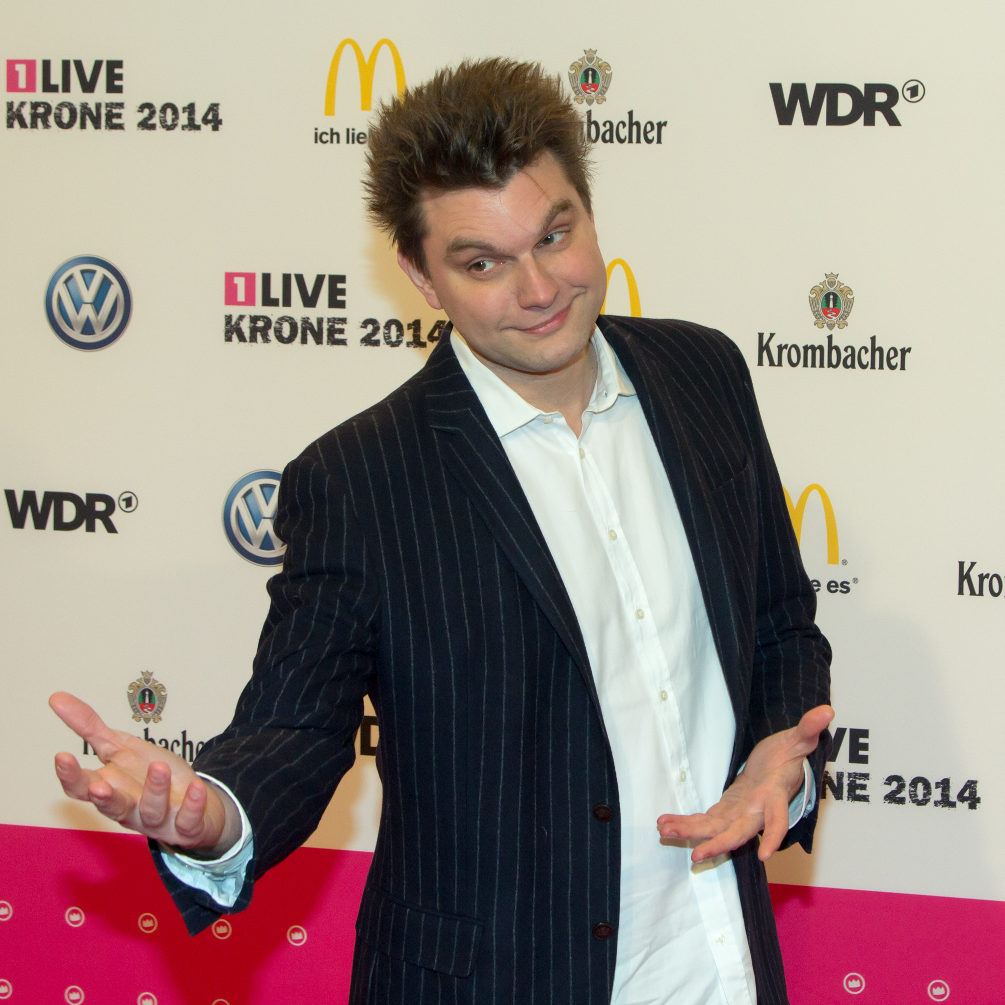 1LIVE Krone 2014 in der Bochumer Jahrhunderthalle: Lutz van der Horst auf dem roten Teppich